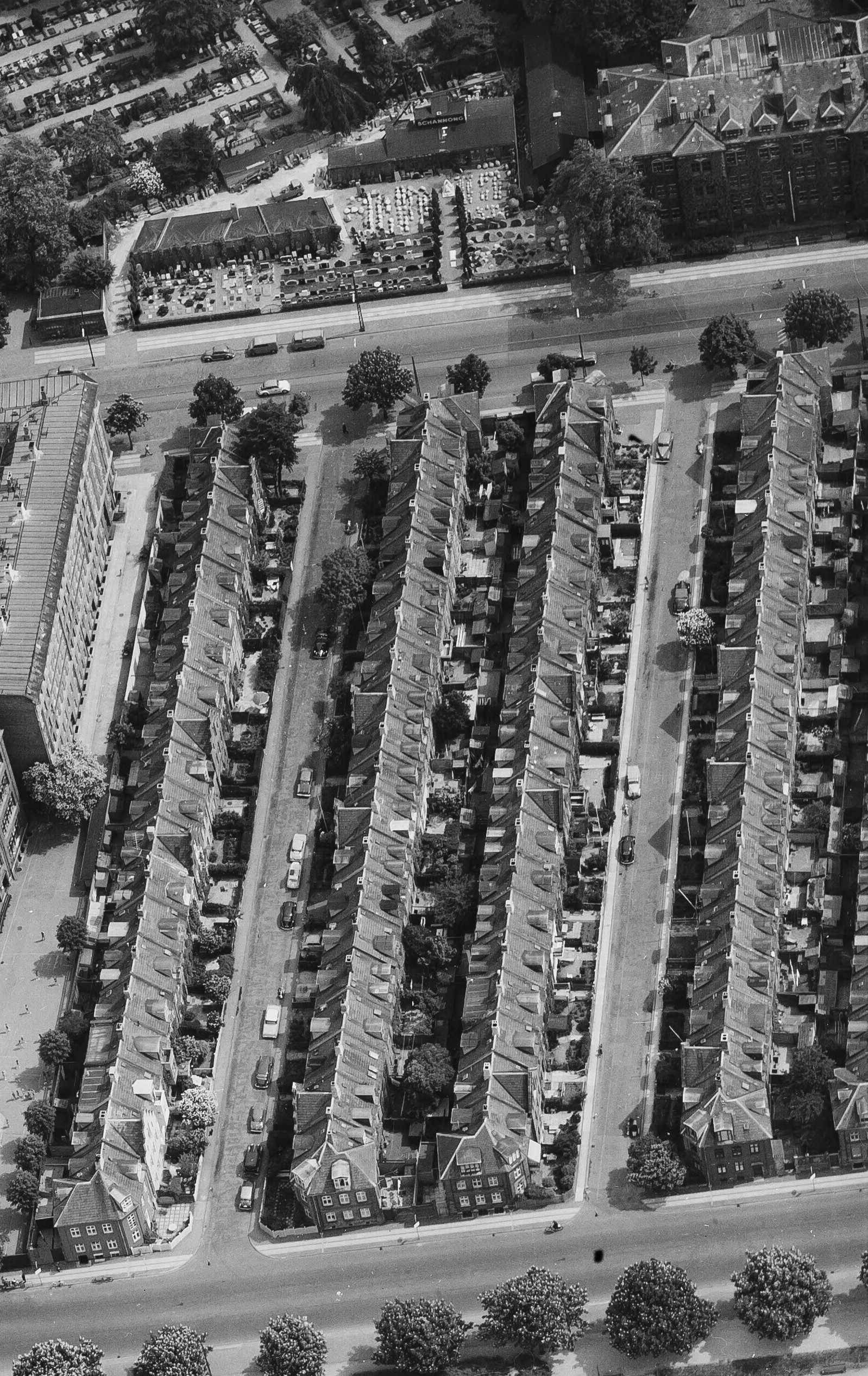 Østerbro 1958. I forgrunden kartoffelrækkerne. Øverst th. Øster Farimagsgades skole. Til venstre for skolen, Schannongs gamle hovedforretning